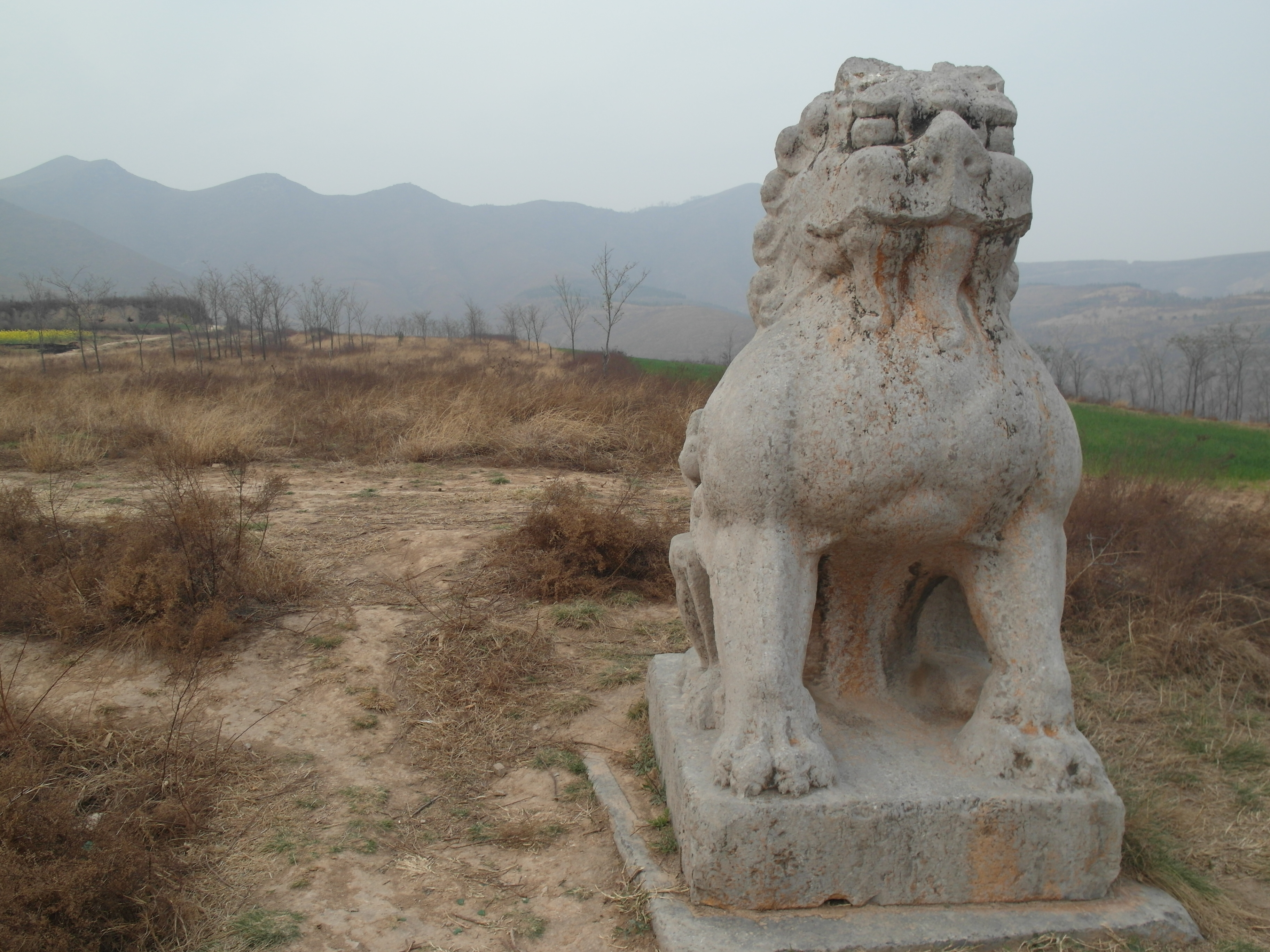 位于陕西省咸阳市泾阳县东北的嵯峨山上